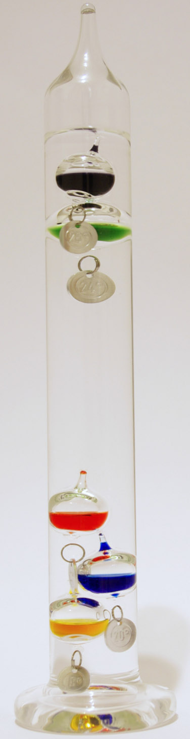 Galileo Thermometer mit farbigen Flüssigkeiten